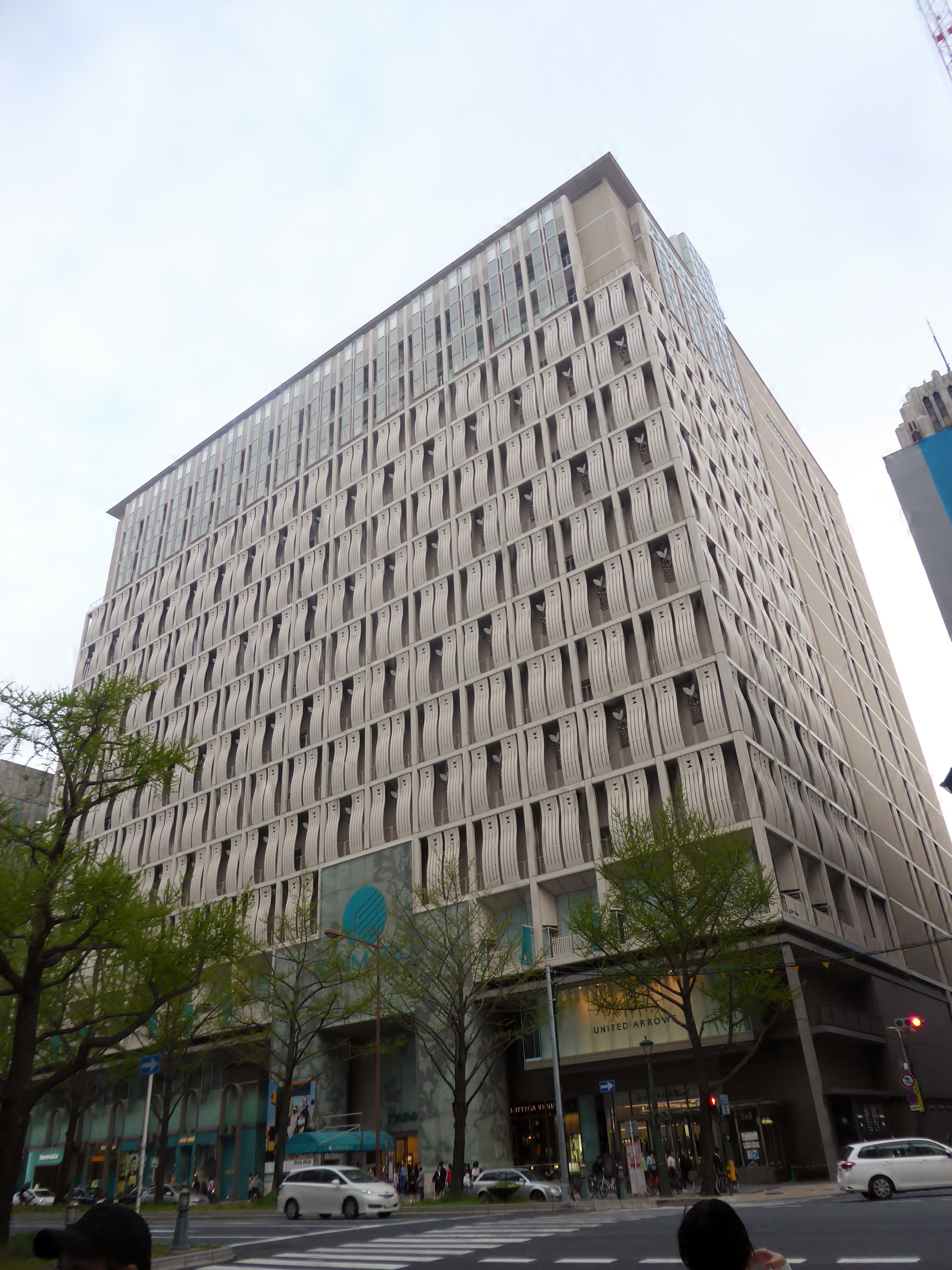 大丸心斎橋店北館を撮影。